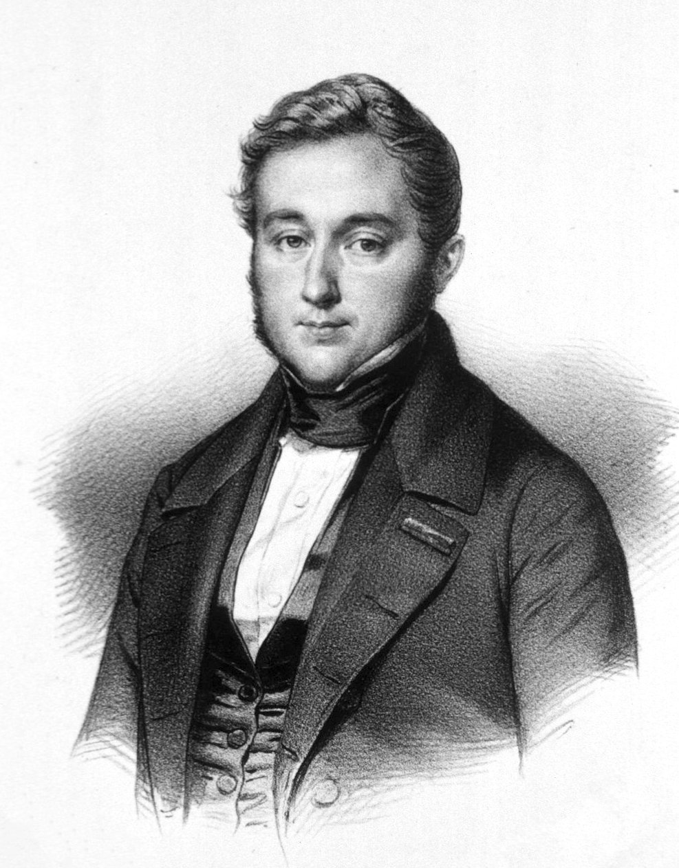 Retrato de Théophile-Jules Pelouze (1807-1867) - Químico Francés Original litografia. Anónimo. 1840 Epoca : Luis Felipe I de Francia